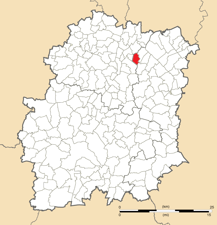 Carte de position de Morsang-sur-Orge en Essonne (91)